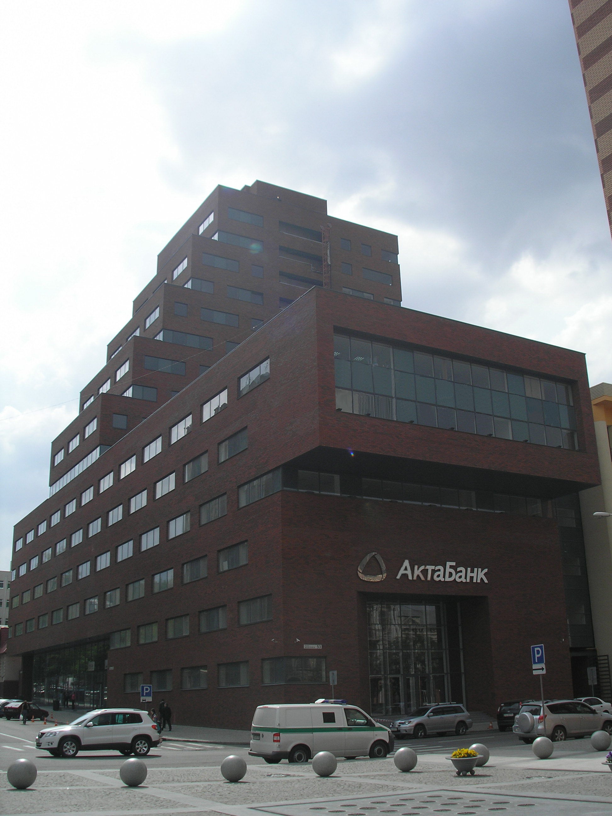 ПАО "АКТАБАНК", Головной офис, ул. Шевченко, 53